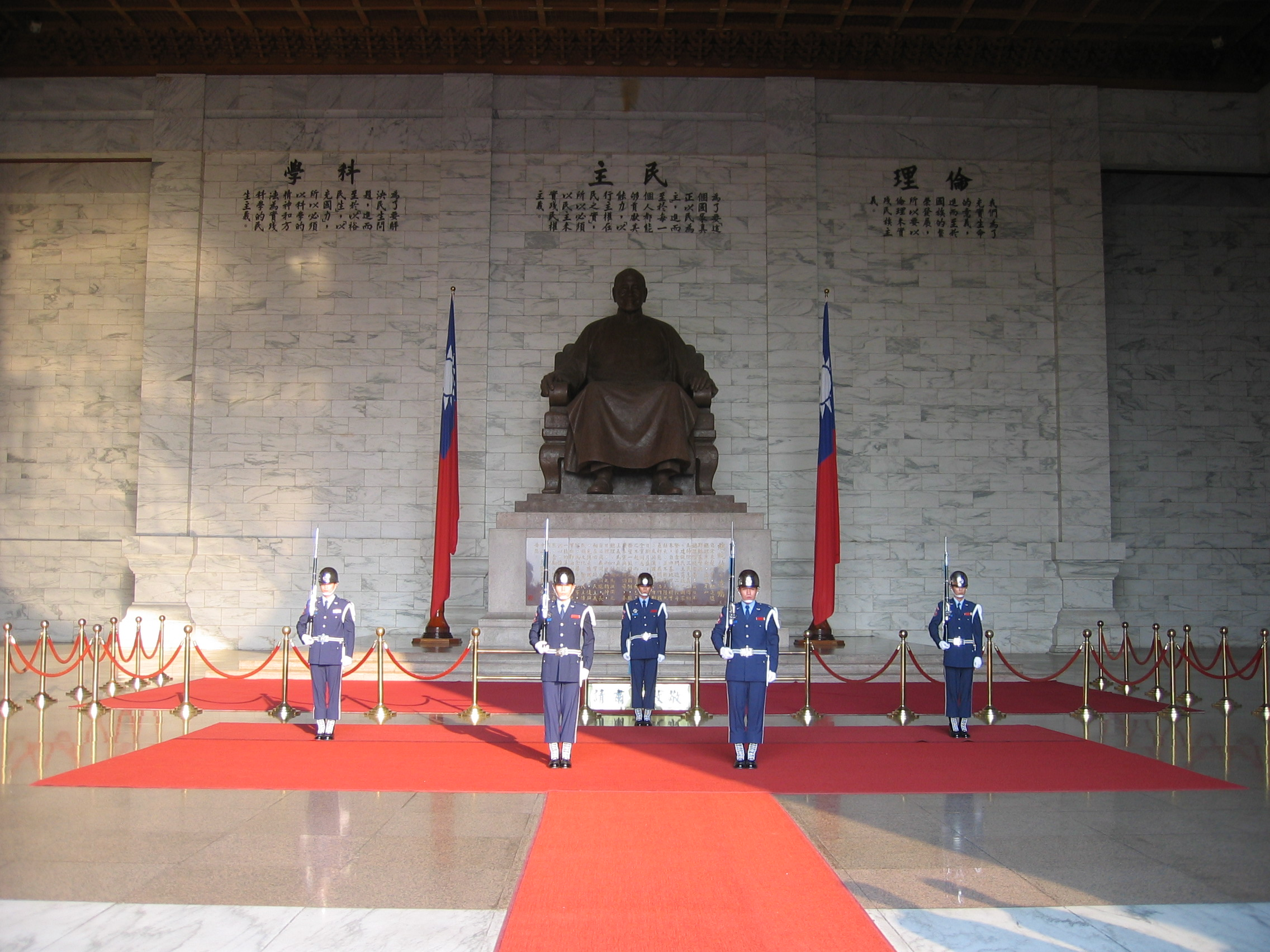 中正紀念堂大廳內的中華民國空軍儀隊。